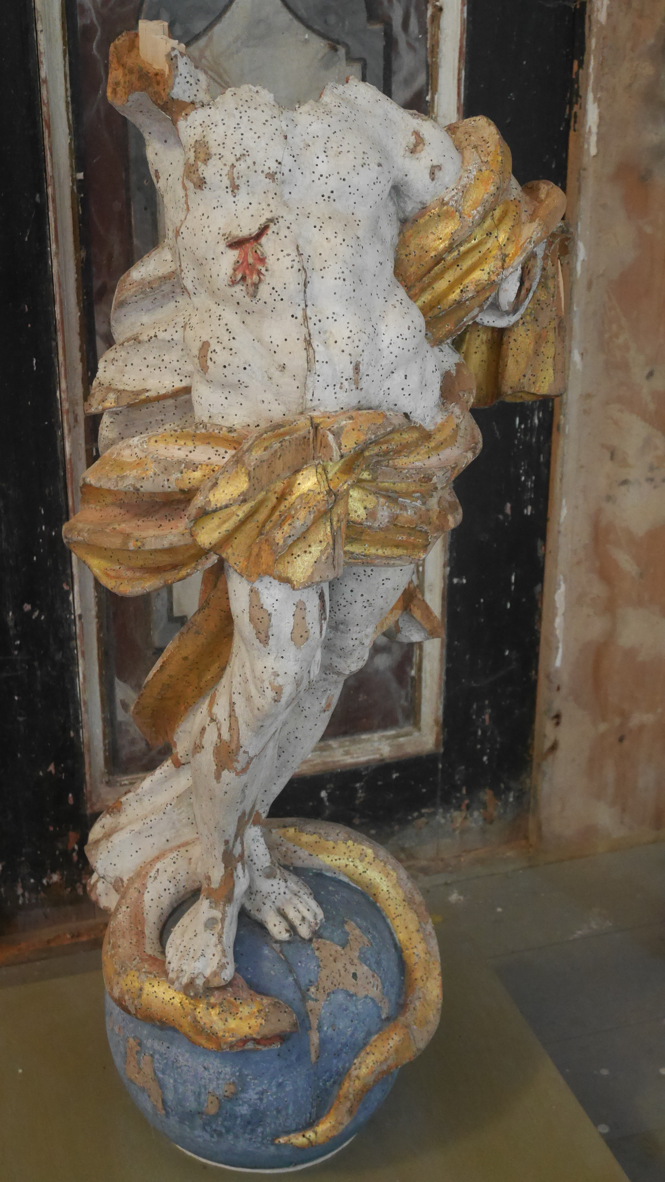 Dorfkirche Reinberg Skulptur Retabel